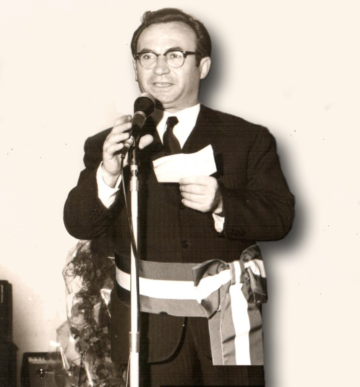 L'avv. Michele Morelli, Sindaco di Barletta dal 1965 al 1970